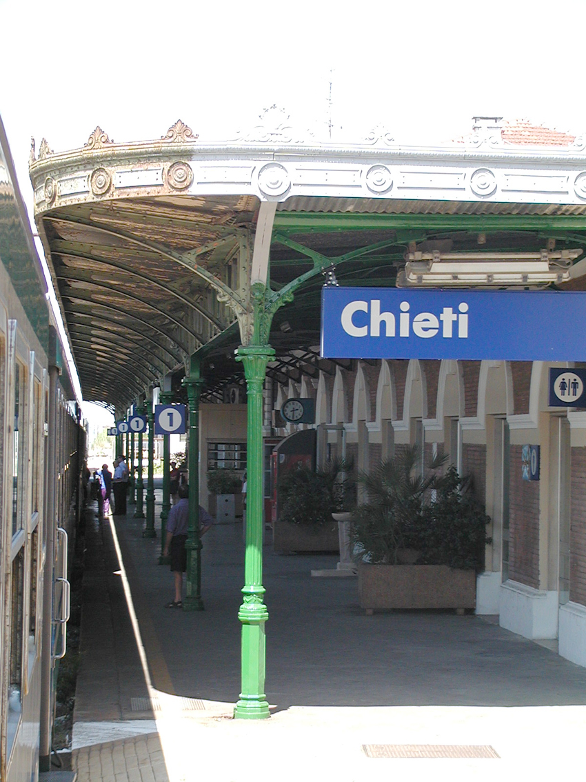 Stazione di Chieti